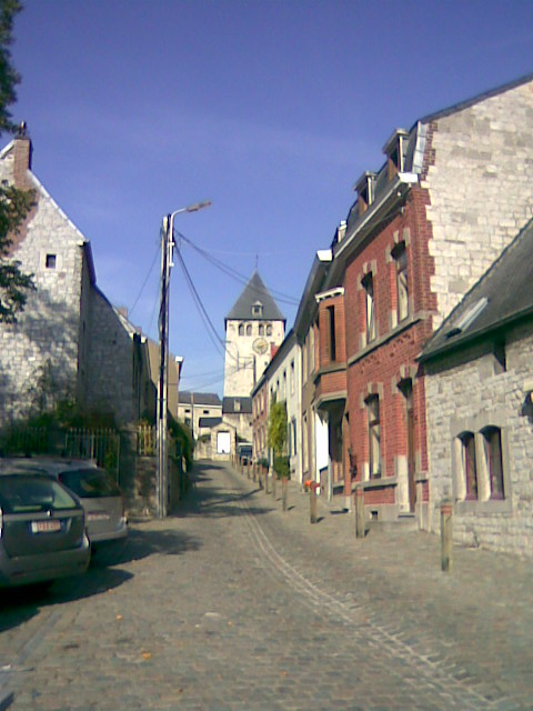 Vue de l'église Saint Etienne de Seilles